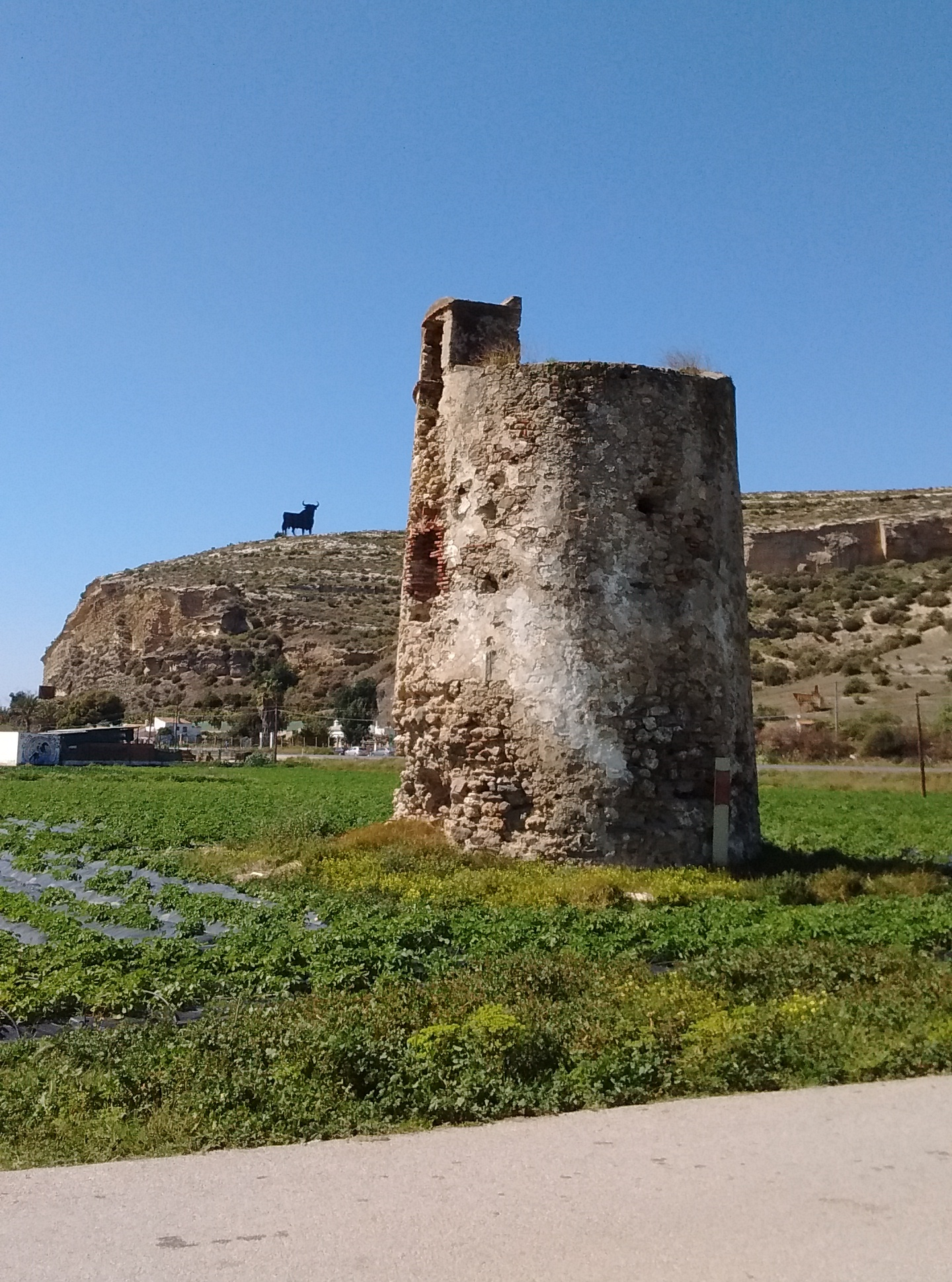 Torre de Manganeta, Torre en la boca del rio Vélez, Torre de Manganeto